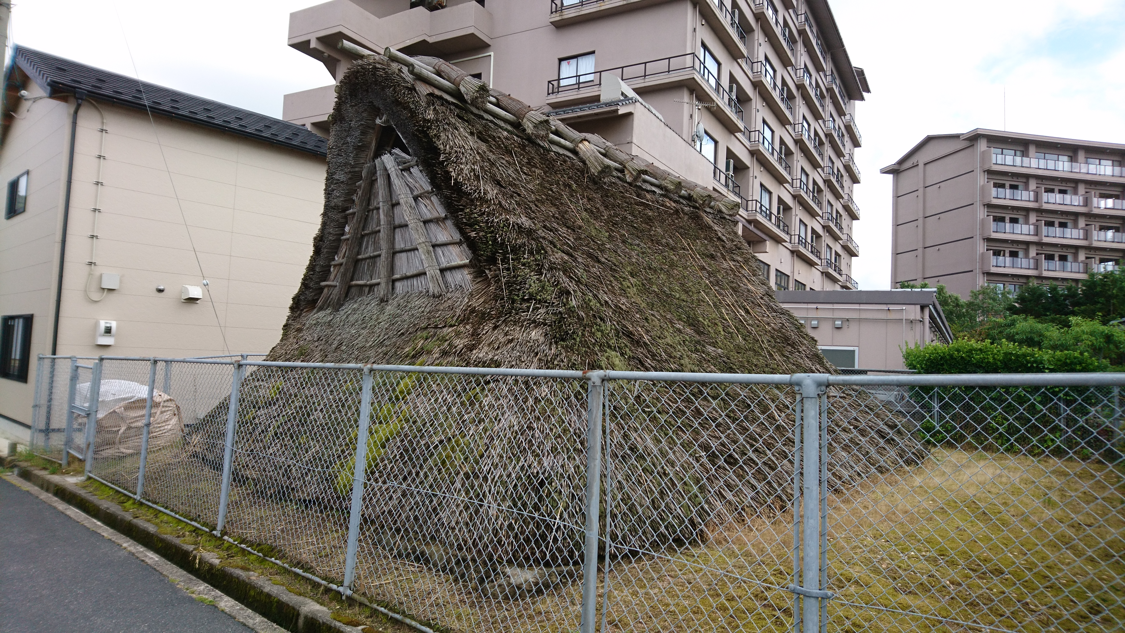 京丹後市網野町浜詰に所在する縄文遺跡（復元）